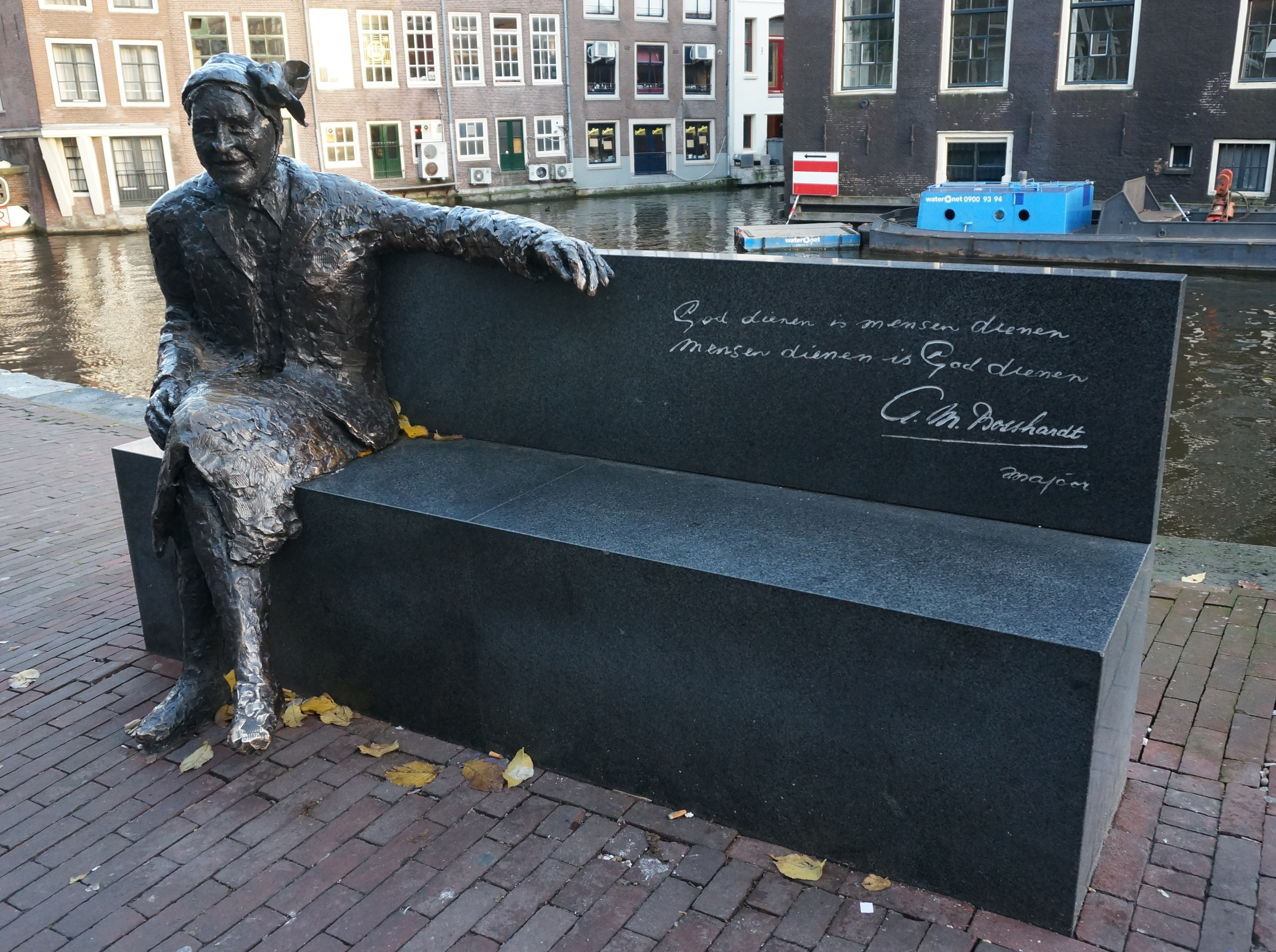 Sculptuur van Majoor Alida Bosshardt op de N.Z.Voorburgwal t.o. 14 in Amsterdam. Brons. Kunstenaar Peter de Leeuwe